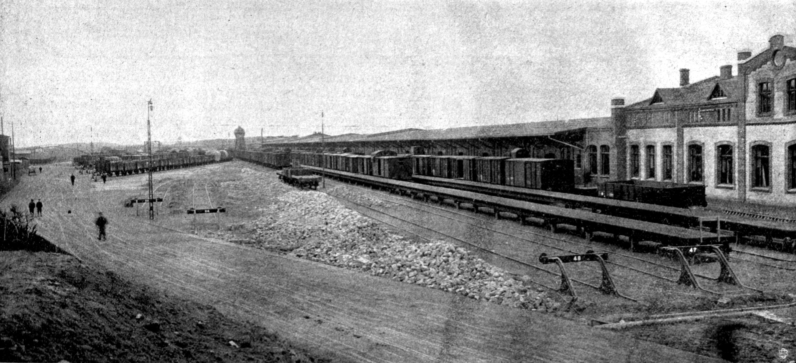 Güterbahnhof Lübeck, eröffnet am 11. März 1907